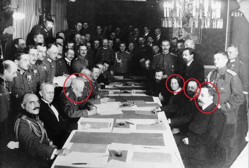 Brest-Litovsk müqaviləsinin nümayəndələri